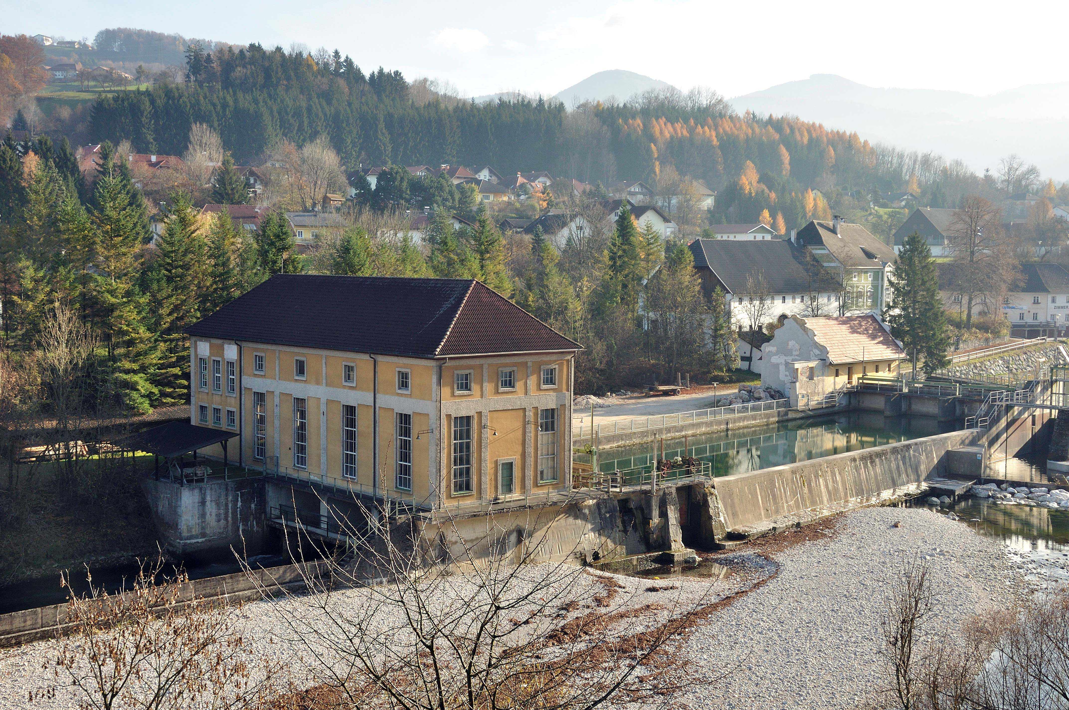 Kraftwerk